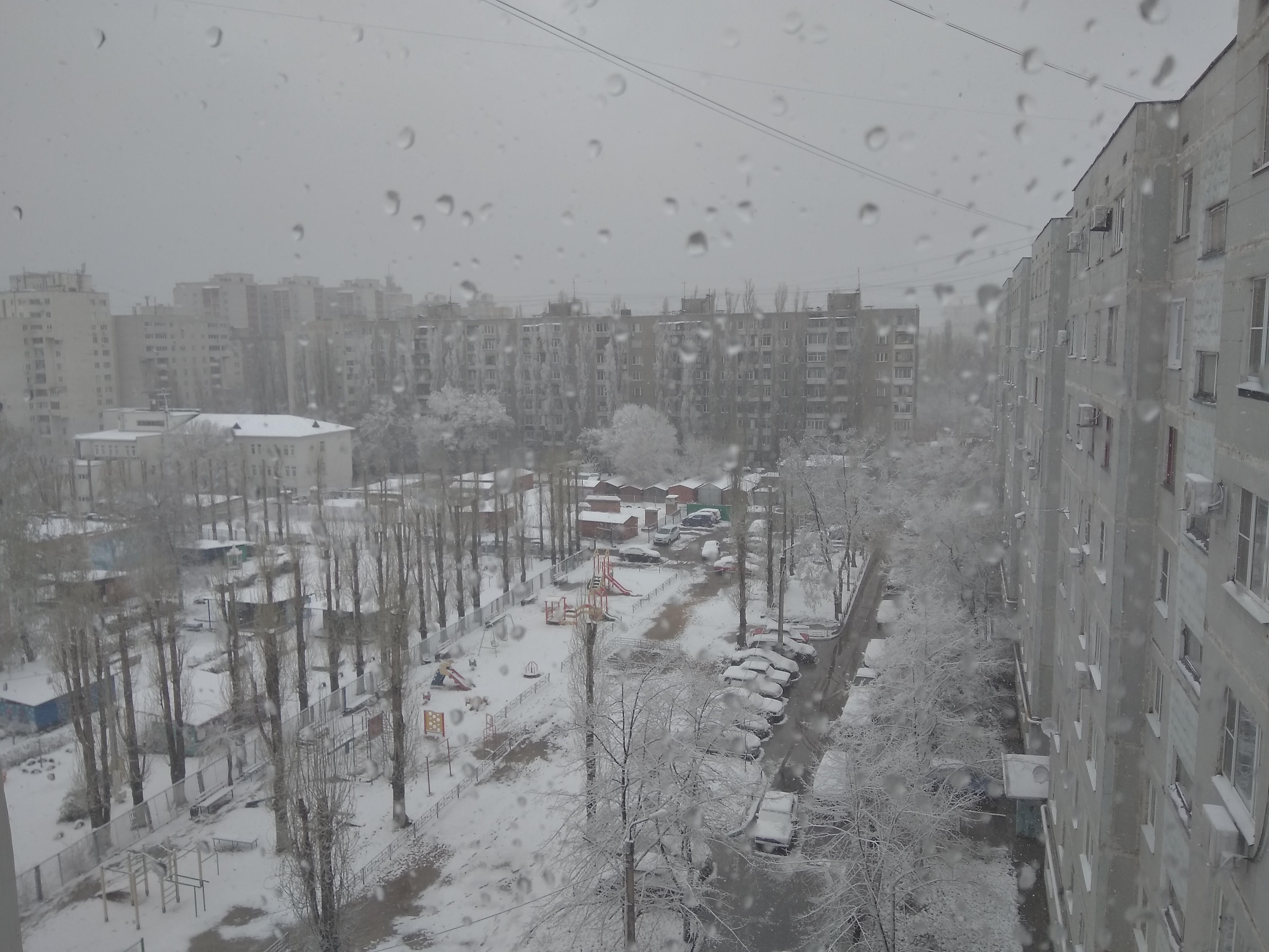 Снегопад в Воронеже 19 апреля 2017 года